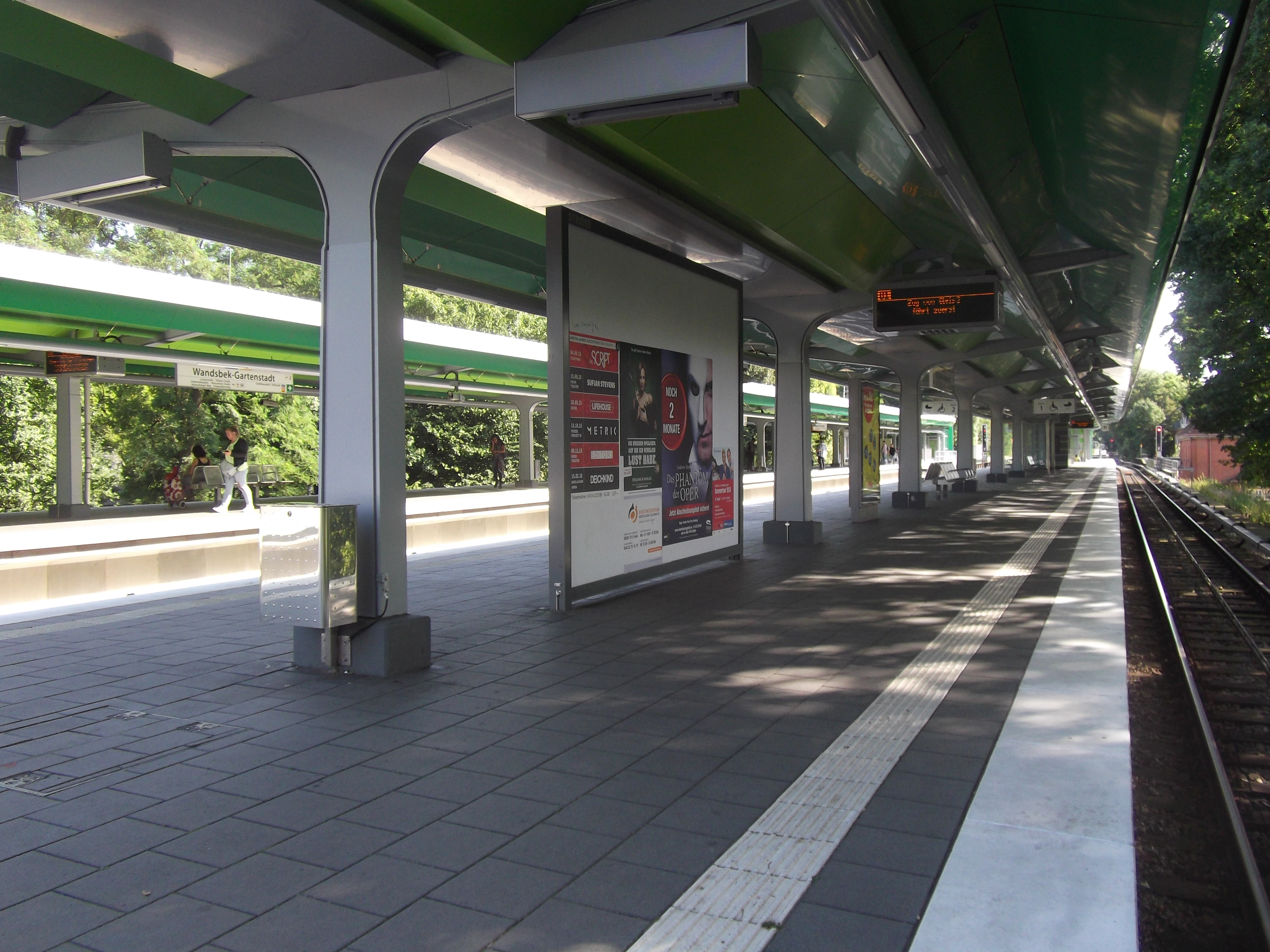 Hamburg, U-Bahn Wandsbek-Gartenstadt